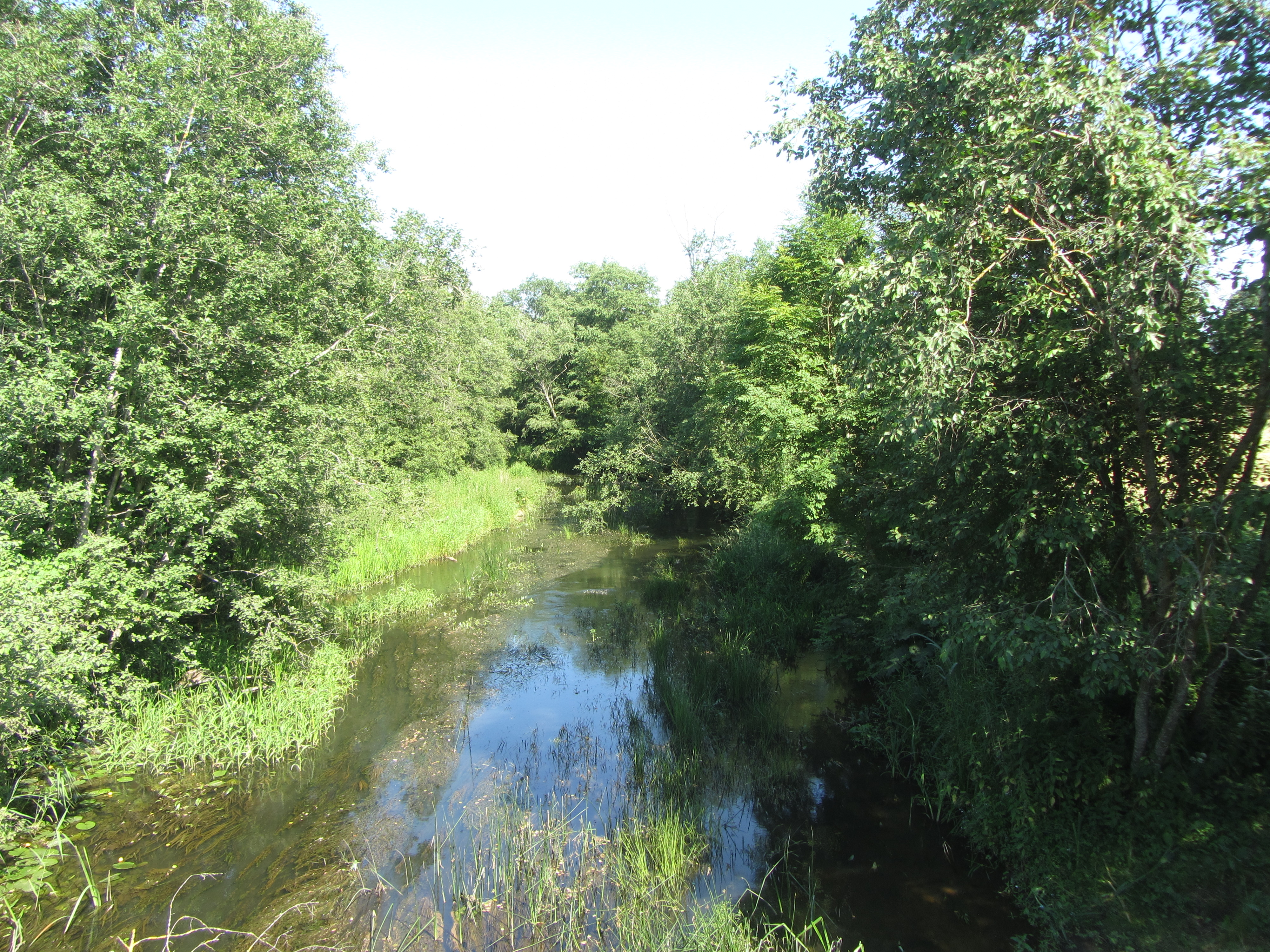 Laičiai 33314, Lithuania